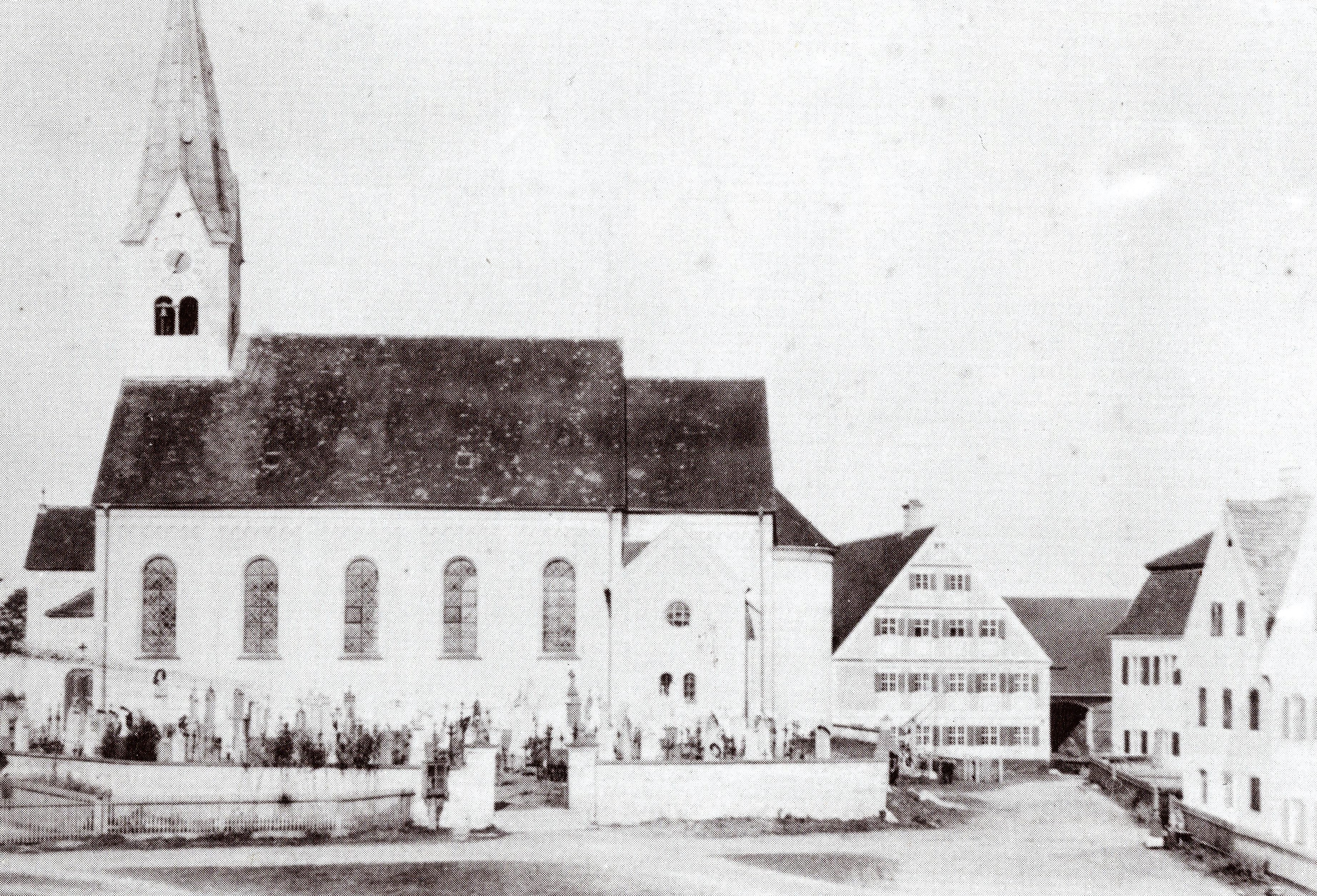 Ansicht der Pfarrkirche von Gersthofen und des Klosterhofes, wohl 1891